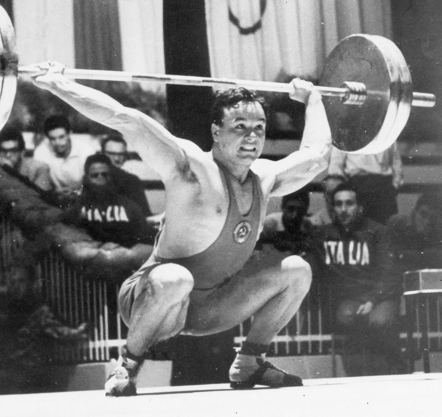 Aleksandr Kurynov